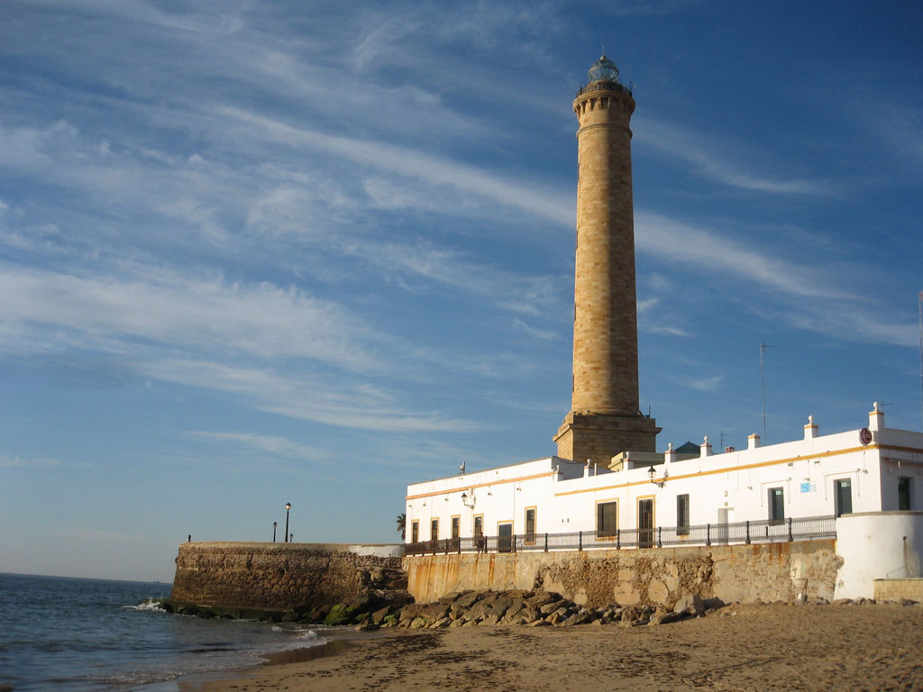 Faro de Chipiona / Chipiona Lighthouse (Cádiz-Andalucía-España)